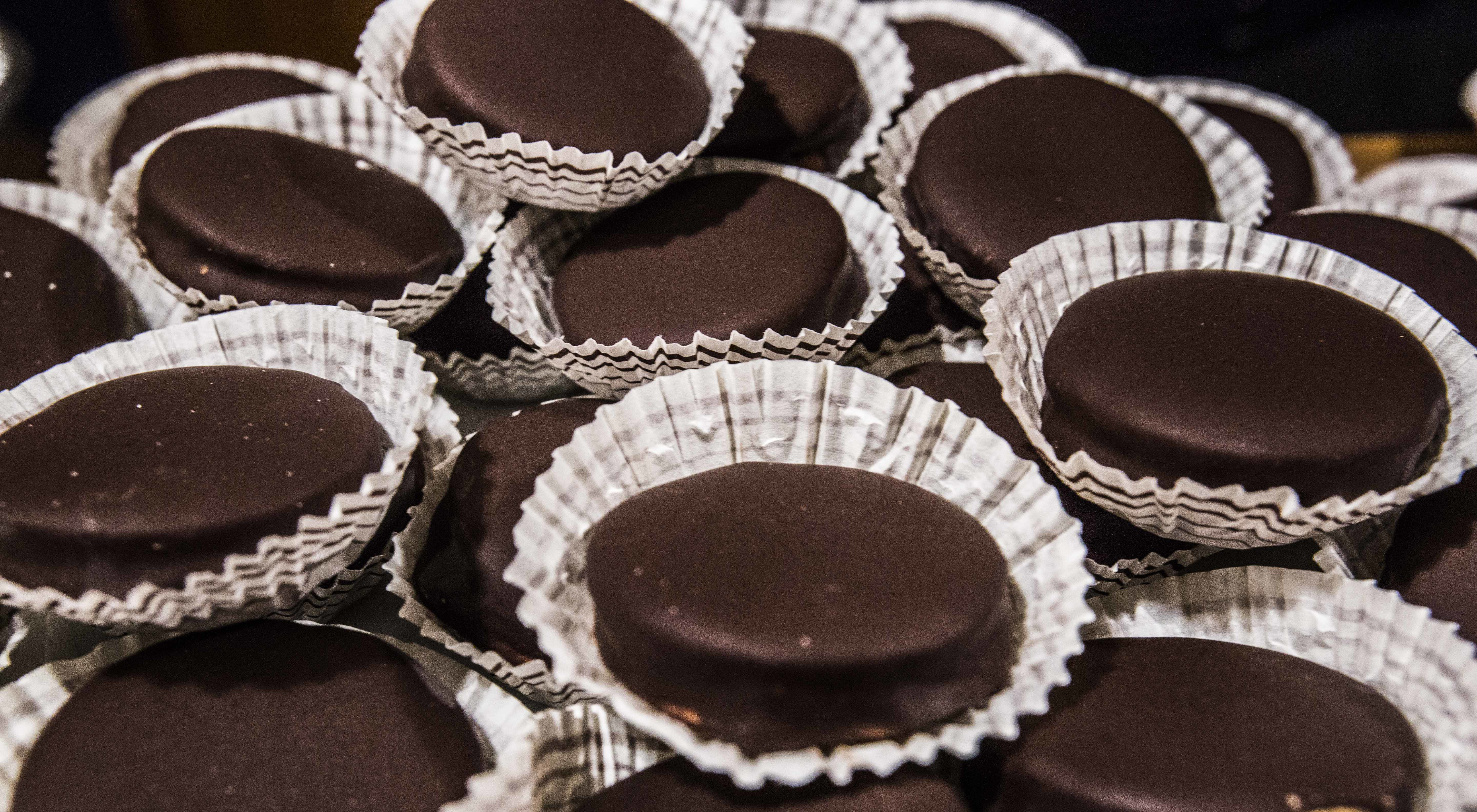 Márciusban a „szomszéd” rendezi a Speciális Téli Olimpiai Játékokat, ezért a menü: Egy csésze Ausztria volt. ahol megtudtuk, miért fontos az osztrákoknak ez a kezdeményezés? Miközben bemutattuk a rendezvényt és a helyszíneket, beszélgettünk a közös múltról is és arról, hogy hogyan ünnepli Ausztria Mária Terézia császár- és királynőt, születésének 300. évfordulóját. Osztrák sütemény az isler Fotó:Európai Bizottság/ Dudás Szabolcs